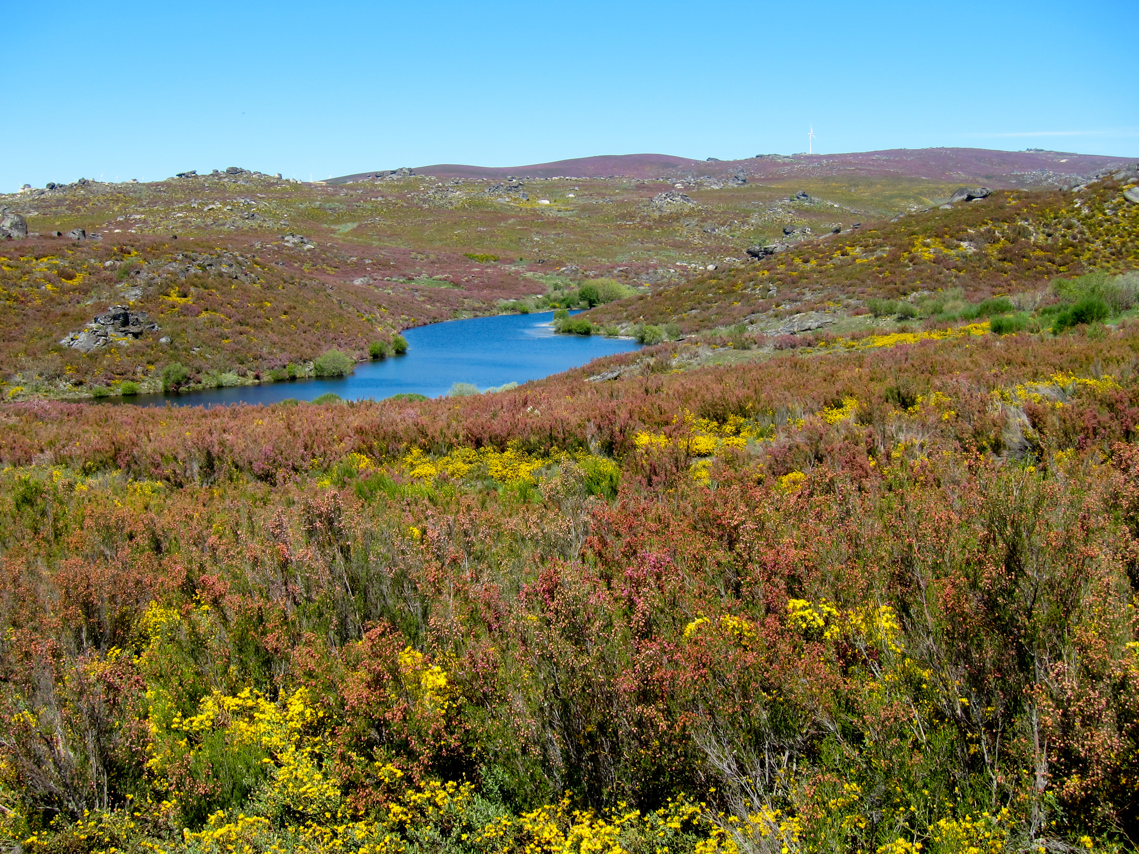 Parque Natural de Montesinho Porto Furado trail